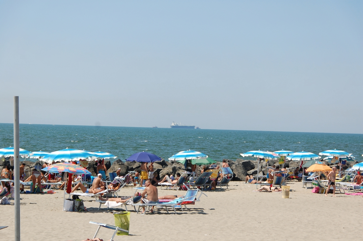 Fiumicino 2011 Durch die Übernahme der UMTS Kosten durch den gemeinnützigen Vereins Skillshare.eu konnte dieses Bild bereitstellen werden. Skillshare e.V. ist ein eingetragener gemeinnütziger Verein zur Förderung der Bildung durch Unterstützung der Erstellung, Sammlung und Verbreitung so genannten freien Wissens. IBAN: DE16 8306 5408 0004 8850 66 BIC: GENODEF1SLR Bank: VR-Bank Altenburger Land